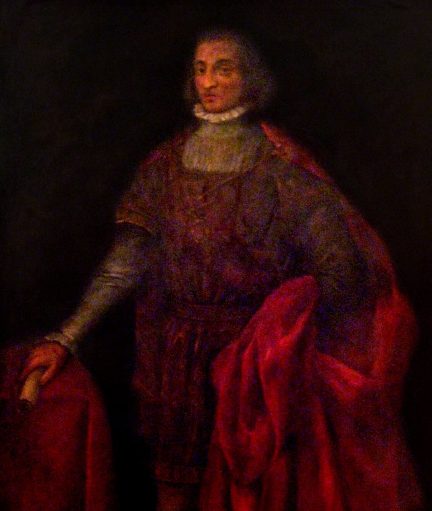 Retrato de Don Lope Hurtado de Mendoza, Señor de la Bujada retrato anónimo del S XIV